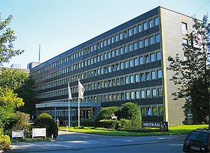 Heitkamp Ingenieur- und Kraftwerksbau GmbH, Firmensitz